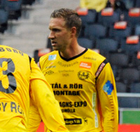 Marcus Pode